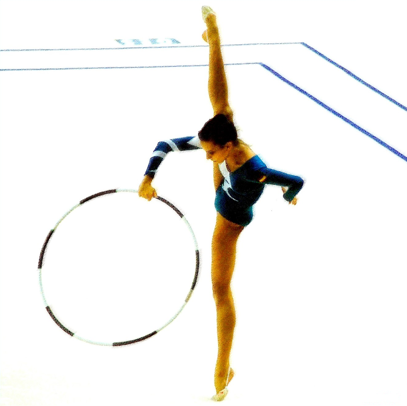 La gimnasta española Carmen Acedo durante el ejercicio de aro en el Campeonato Mundial de Gimnasia Rítmica de 1993, celebrado en Alicante.